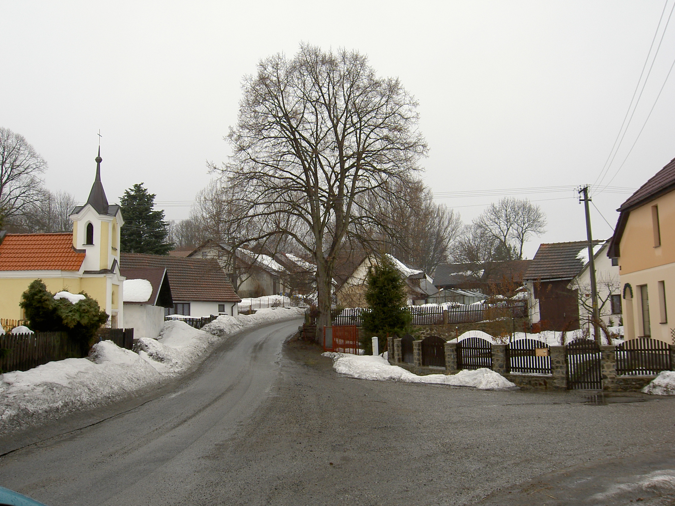 Boňkov, vesnice v kraji Vysočina